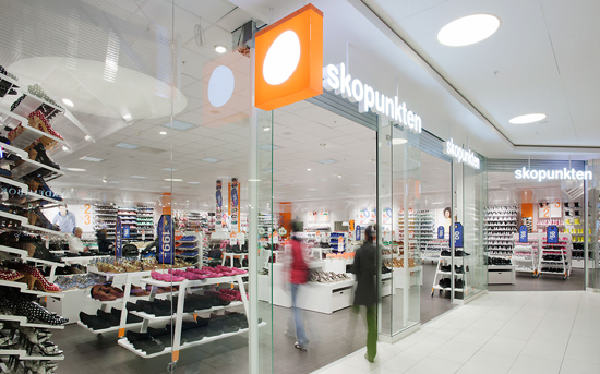 Skopunktens butik i Gävle.